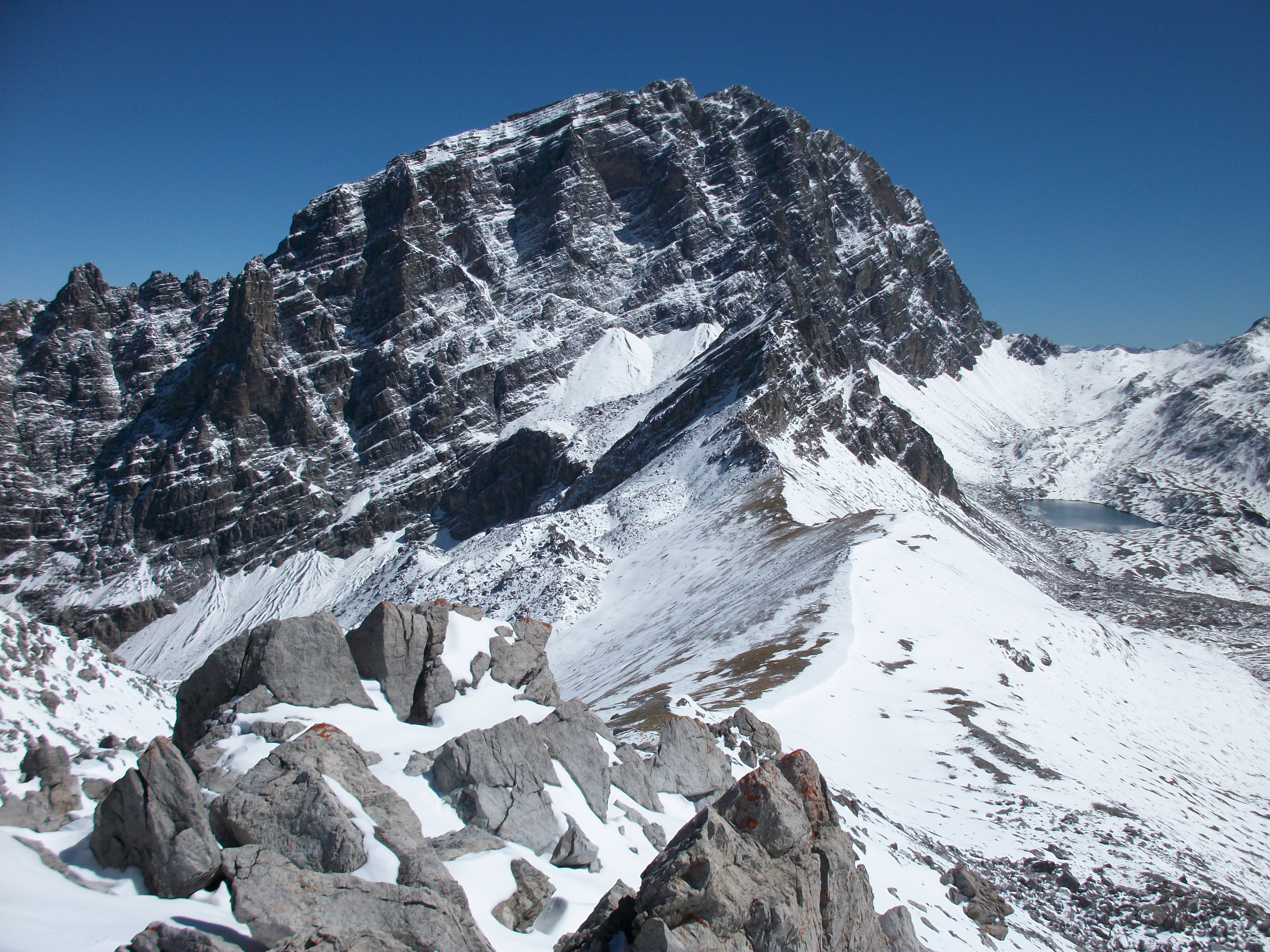 Piz Ela mit Ela-Pass und Lai Grond bei Schnee im Sommer